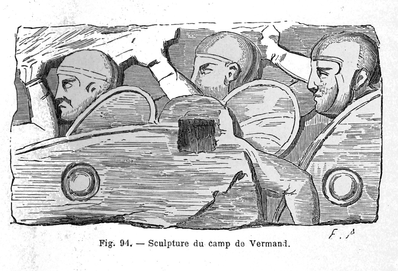 extrait du livre "antiquités et monuments du département de l'Aisne".